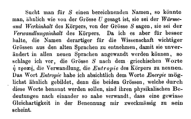 From R. J. E. Clausius, Ueber verschiedene für die Anwendung bequeme Formen der Hauptgleichungen der Mechanischen Wärmetheorie